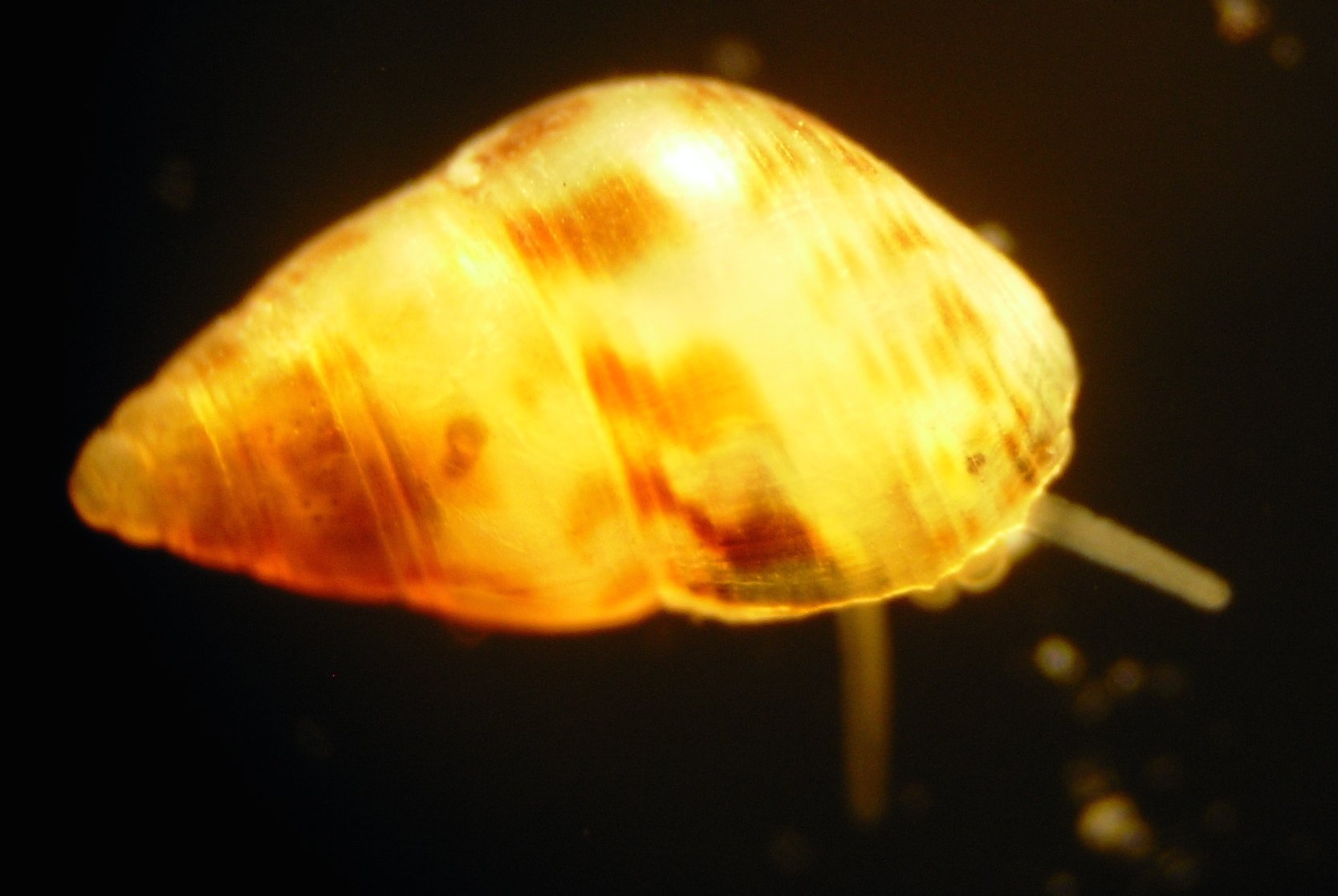 Crisilla semicostata. Animal rampant.